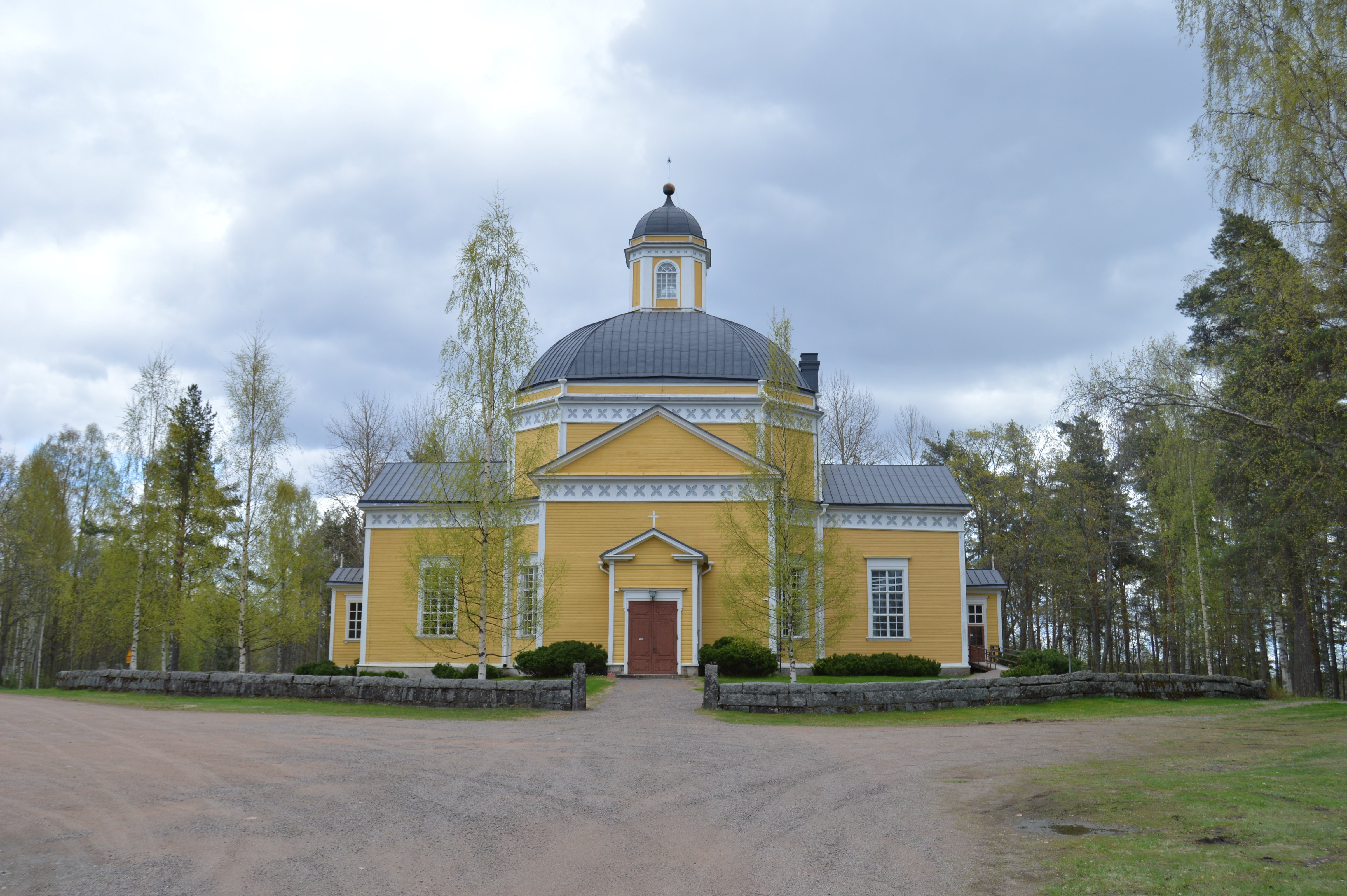 Luumäen kirkko